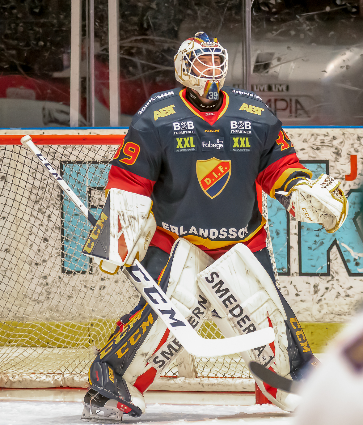 Djurgården-Färjestad 20190129